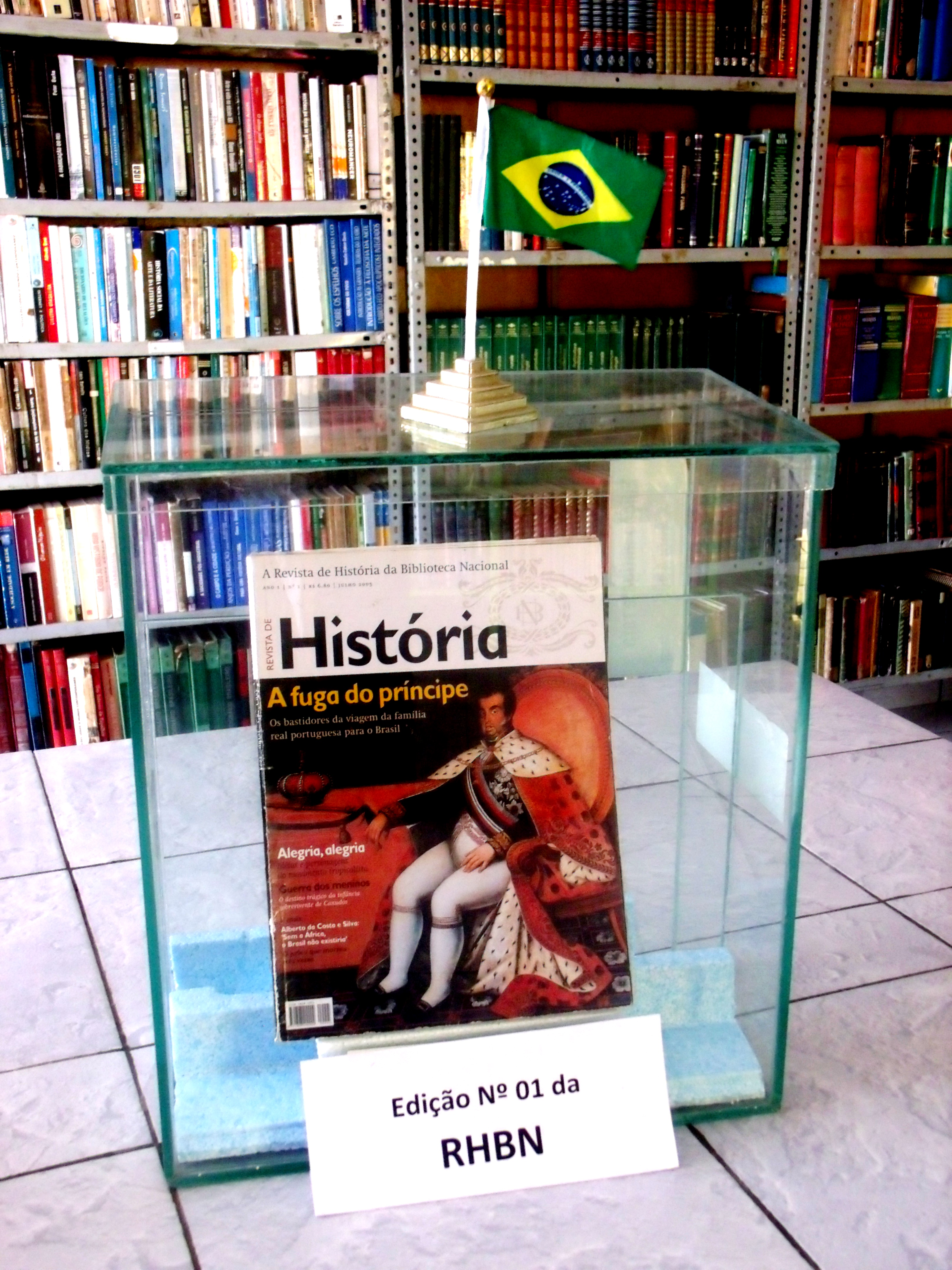 Exposição de primeiro número da Revista de História da Biblioteca Nacional do Brasil em uma Biblioteca Pública.